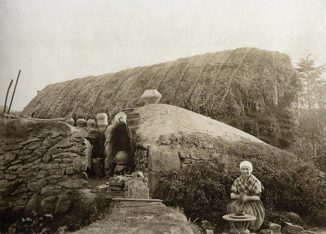 La potière devant son four (photographie prise vers 1910 dans le cadre de la préparation d'un livre de Louis Franchet Céramique primitive, publié en 1911 ; la potière est Madame Colin, de Lannilis. Il existait alors encore neuf familles de potiers en activité à Lannilis.